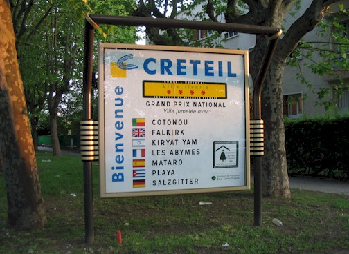 Vue du panneau d'entrée de ville à Créteil (Val-de-Marne)